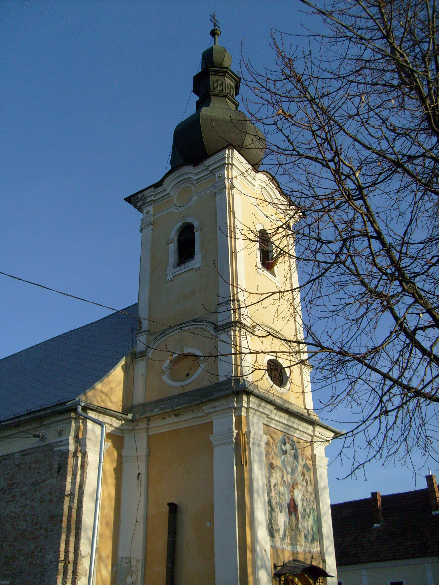 Biserica Bob din Târgu Mureş